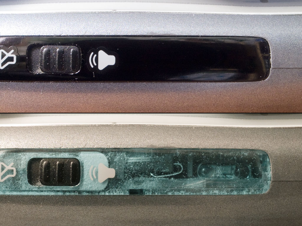 Telefon infraportja hagyományos és infravörös fényképen